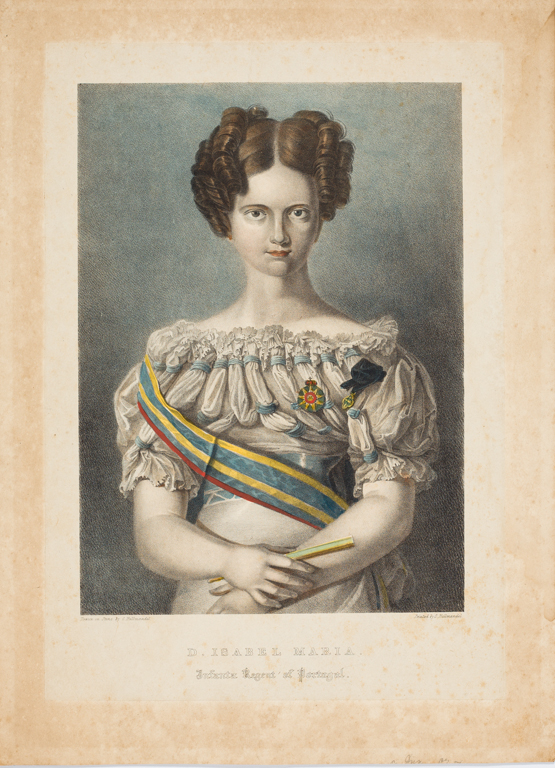 Obra de arte no museu da Moda Brasileira